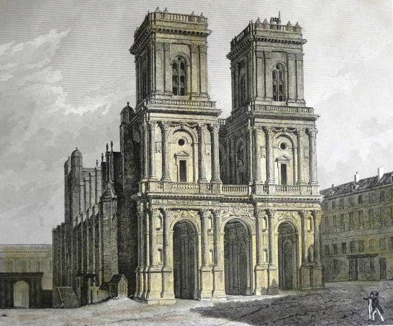 Gravure de la Cathédrale Sainte-Marie d'Auch, issue de l'ouvrage "Les Monumens de la France", 1836.